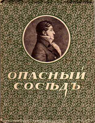 Пушкин В.Л. Опасный сосед. (Труды Пушкинского дома при Российской академии наук). Под редакцией и со статьей В.И.Чернышева. Петербург. Атеней, 1922